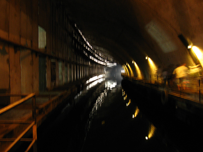 Balaclava, tonnel in submarine Soviet navy base